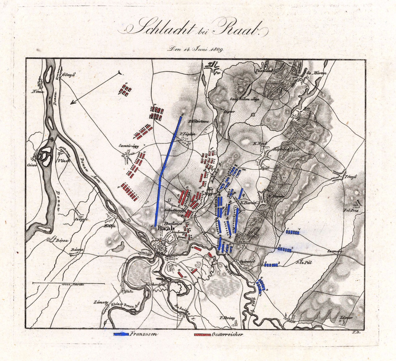 Plan der Schlacht bei Raab (1809)